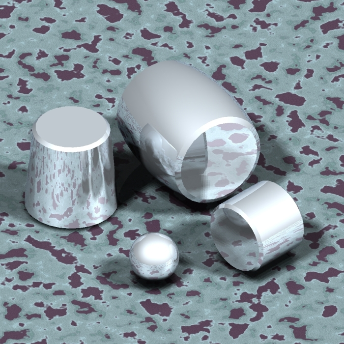 Eléments roulants d'un roulement. Image de synthèse réalisée avec SolidWorks